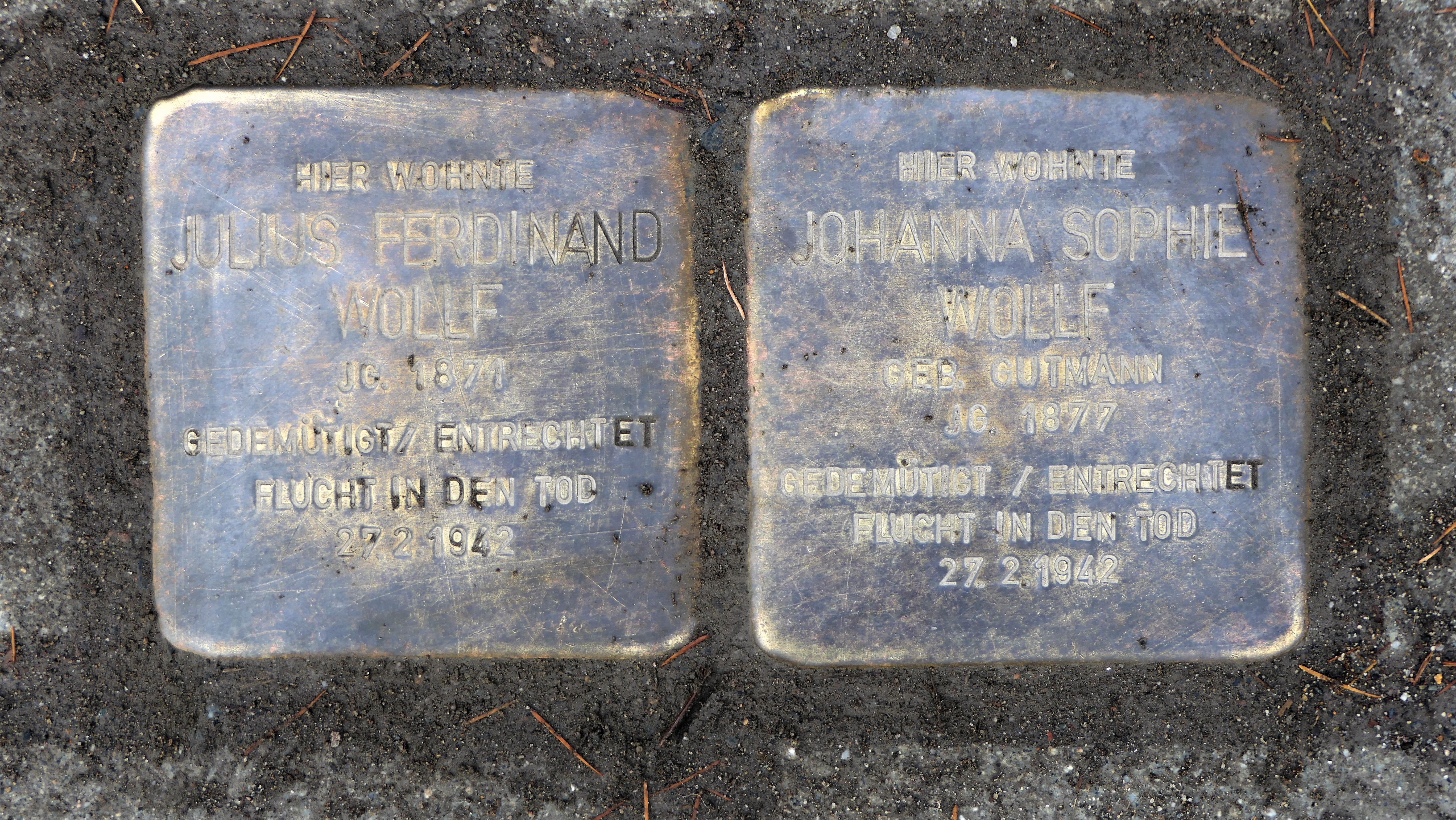 Stolperstein für Julius Ferdinand und Johanna Sophie Wollf, Franz-Liszt-Straße Ecke Wiener Straße, Dresden